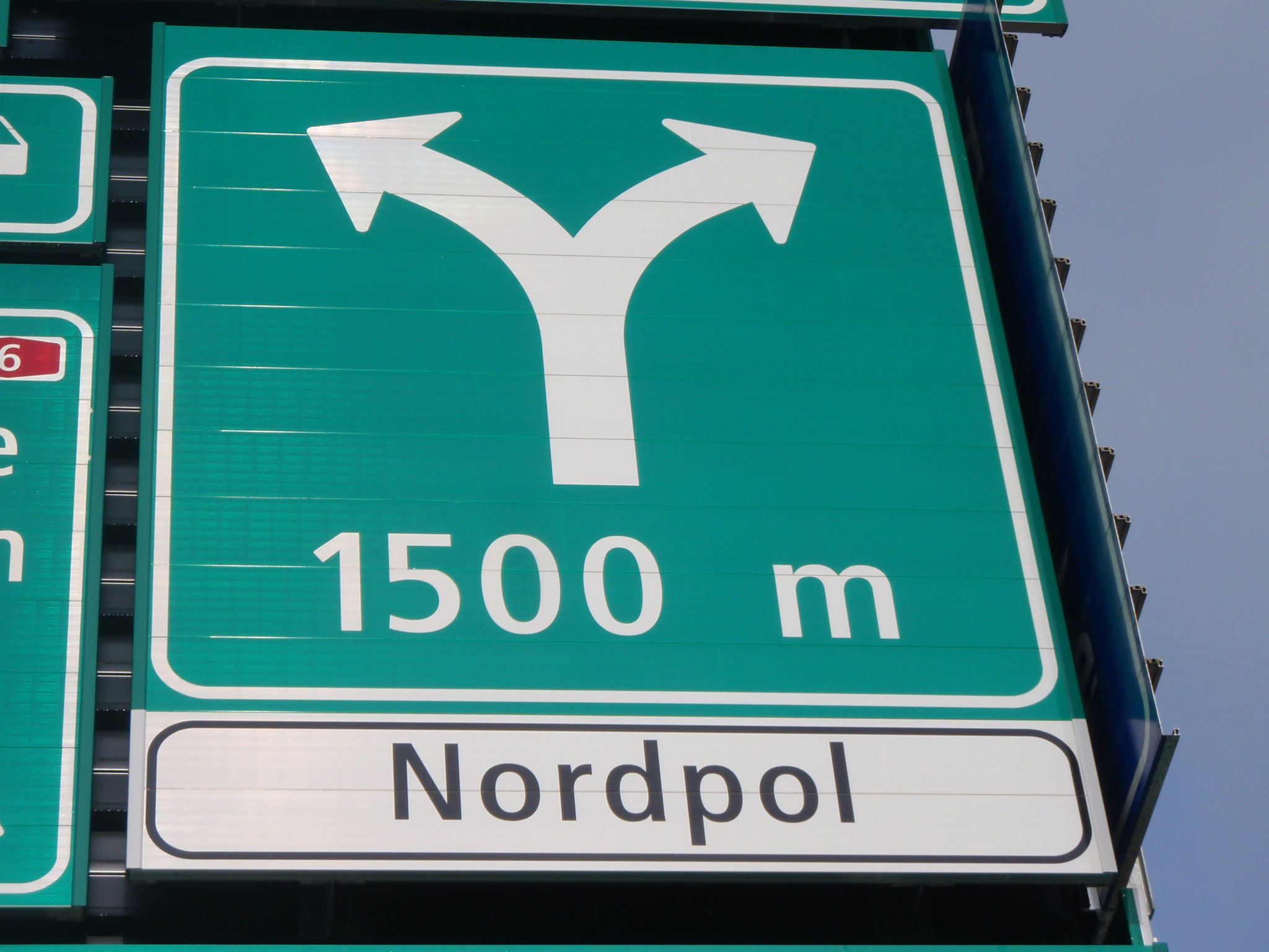 Schweizer Symbol für ein Autobahndreieck. Der Name "Autobahndreieck Nordpol" ist imaginär. Das Verkehrsschild bildet den Teil einer Ausstellung im Verkehrshaus Luzern.